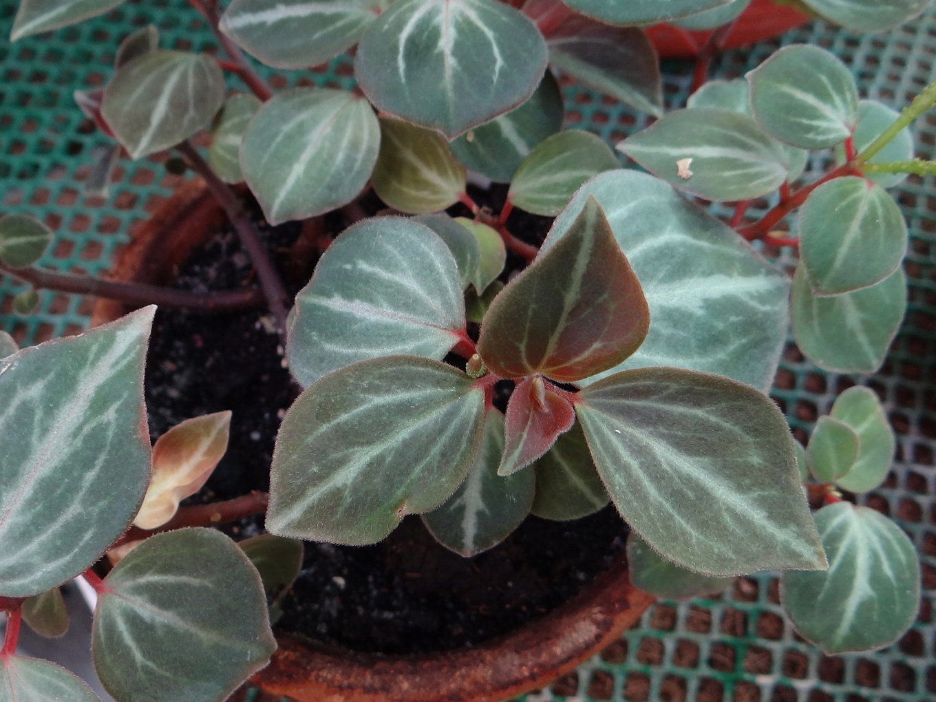 Peperomia marmorata